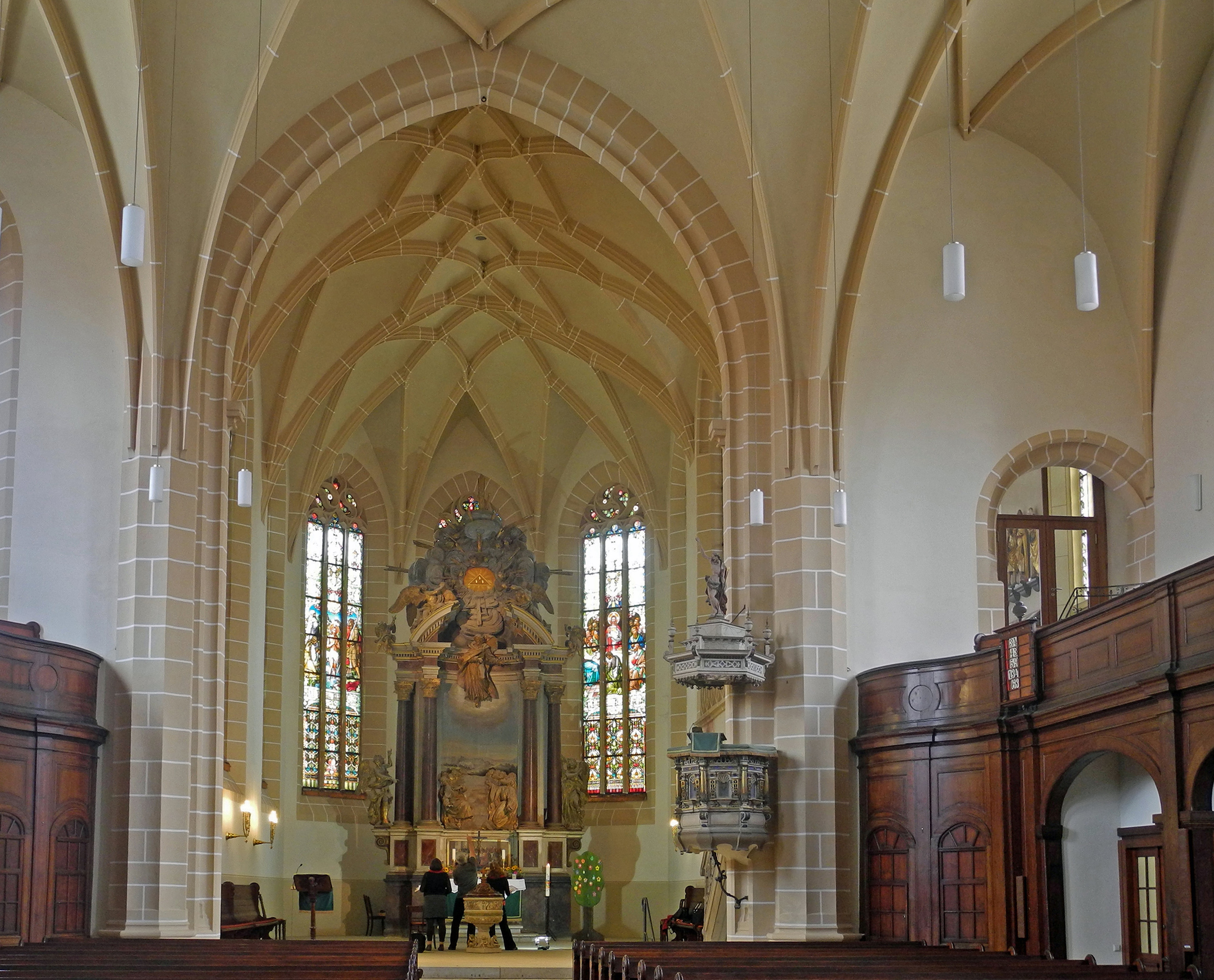 Innenraum der Stadtkirche St. Wenzel in Lommatzsch am Kirchplatz; Umbau 1852–1854 im neugotischen Stil durch Ernst Hermann Arndt.